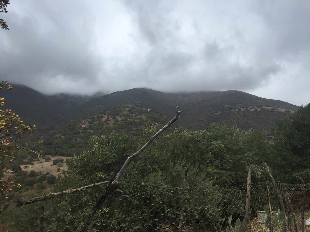 région d'Agouillal